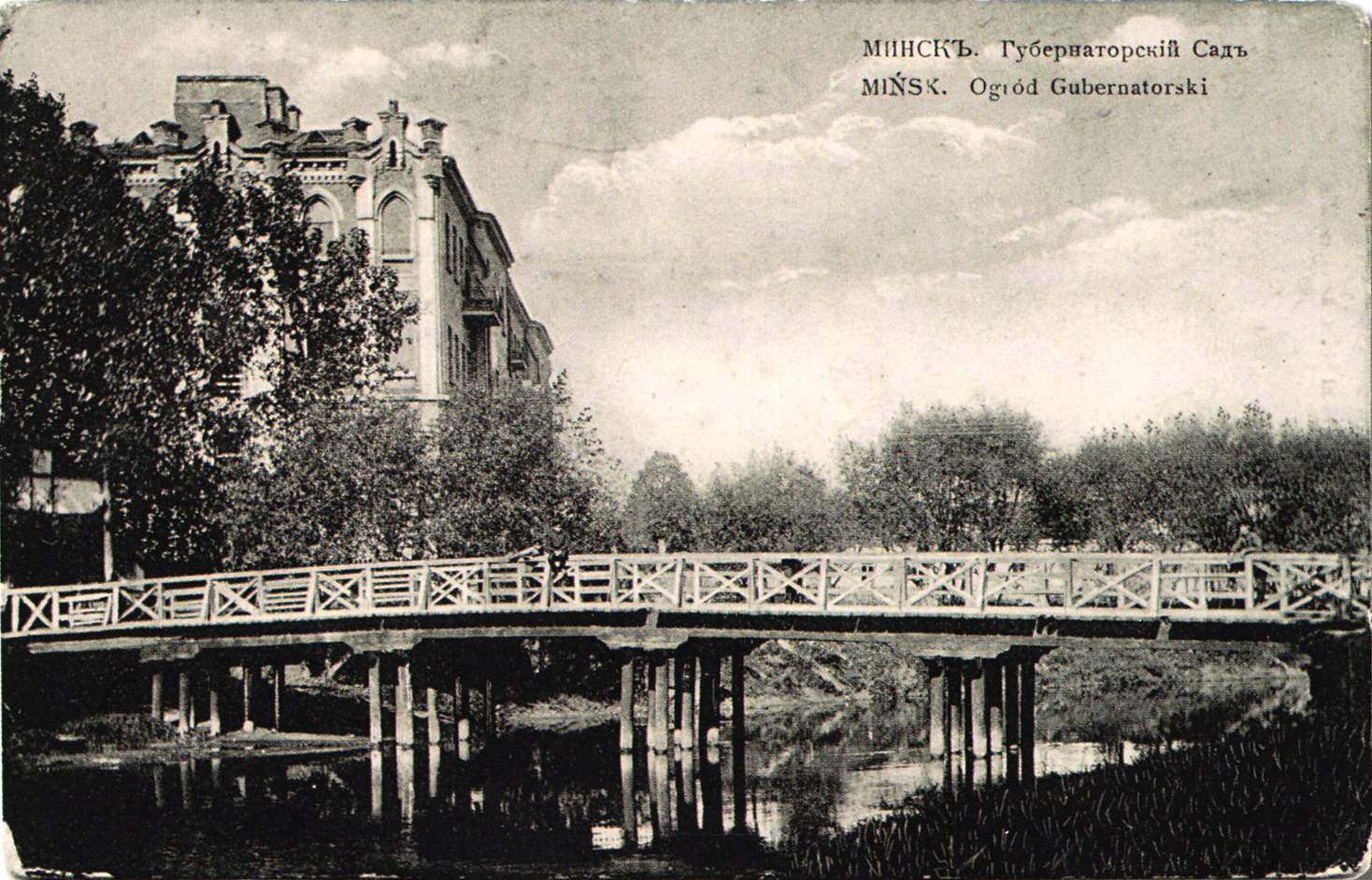 Беларуская (тарашкевіца): Менск (Miensk), мост цераз раку Сьвіслач (Śvisłač) у Мескім Садзе